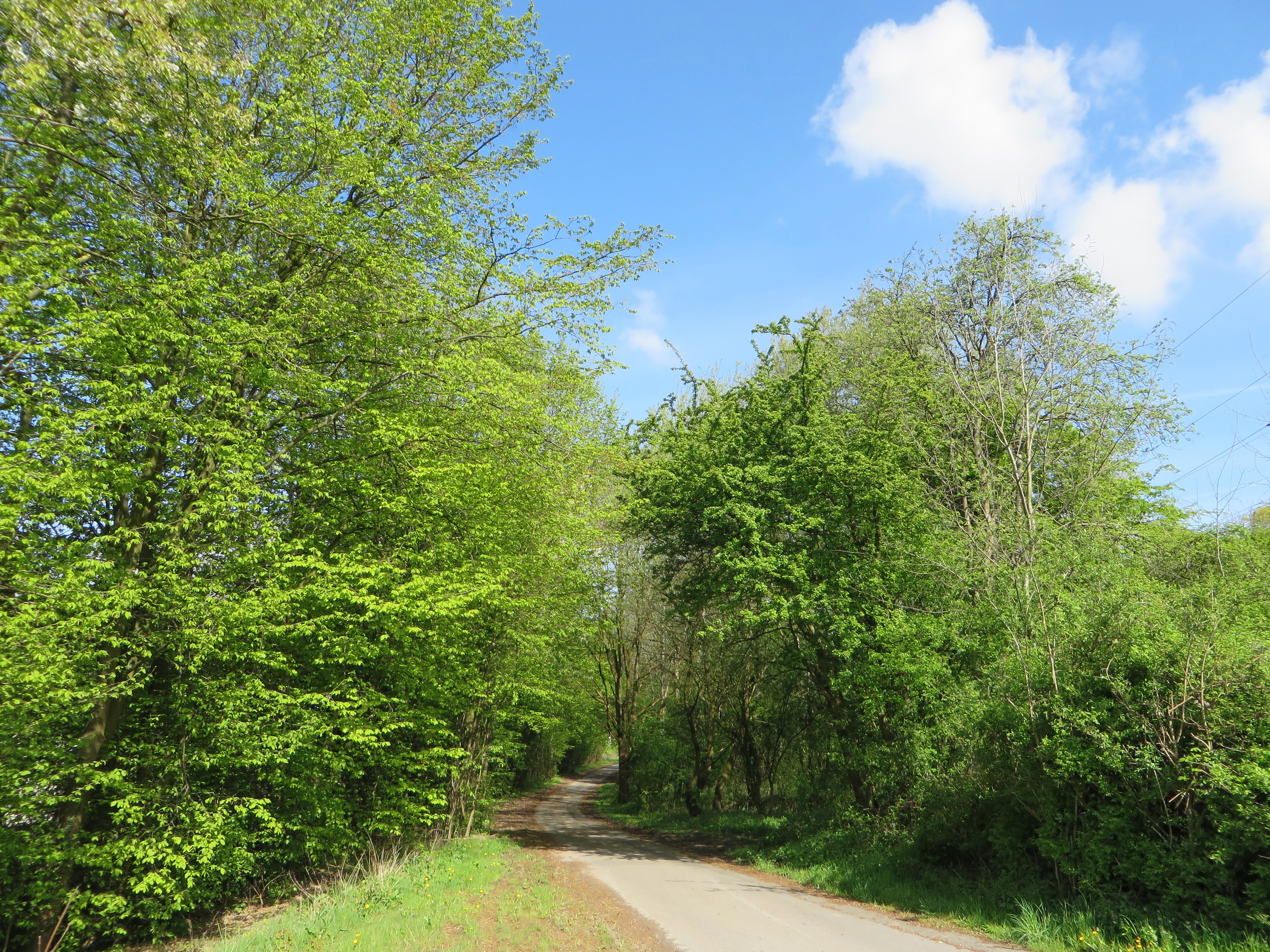 Naturschutzgebiet HA-017 „Ochsenkamp“ in Hagen. Das kleine geschützte Waldgebiet liegt östlich vom Donnerkuhler Weg, zwischen Eppenhausen und dem Steinbruch der Dolomitwerke. Am westlichen Hang des Steinbruchs stockt ein naturnaher Kalkbuchenwald, an den sich ein verbuschter ehemaliger Kalksteinbruch anschließt. Ein Teil dieses Gebietes wird durch eine südwestexponierte Kalkblockschutthalde geprägt. Bei dem südlichen Teilgebiet handelt es sich um ein wertvolles, ca. 200 Jahre altes Buchenaltholz.